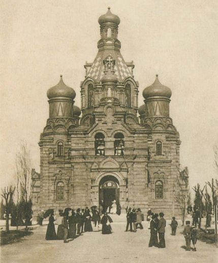 Церква св. Дмира Ростовського: Друге християнське кладовище